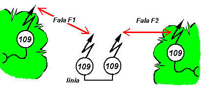 Realizacja retranslacji jako sposób na zwiększenie zasięgu radiostacji UKF małej mocy. Zdjęcie pochodzi ze strony